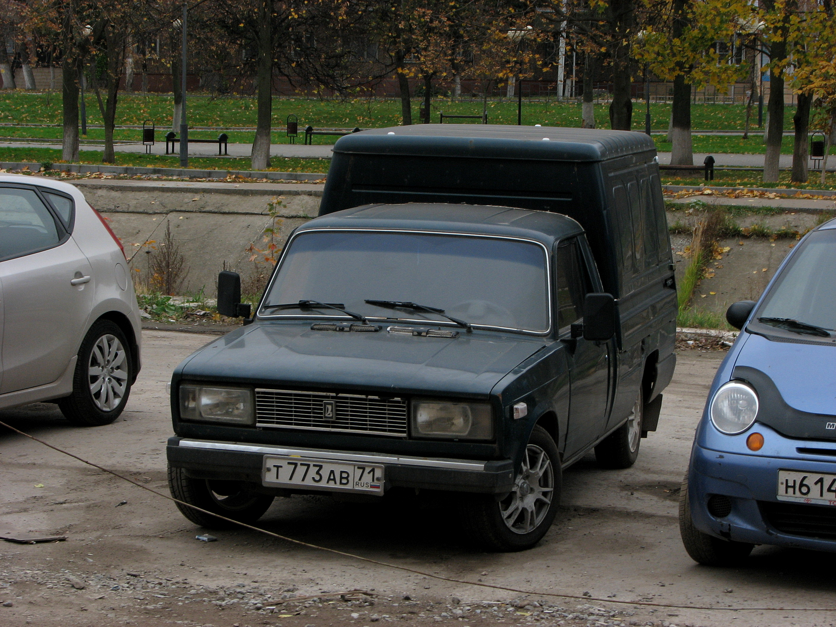 ИЖ-27175-030,Тула, Россия.